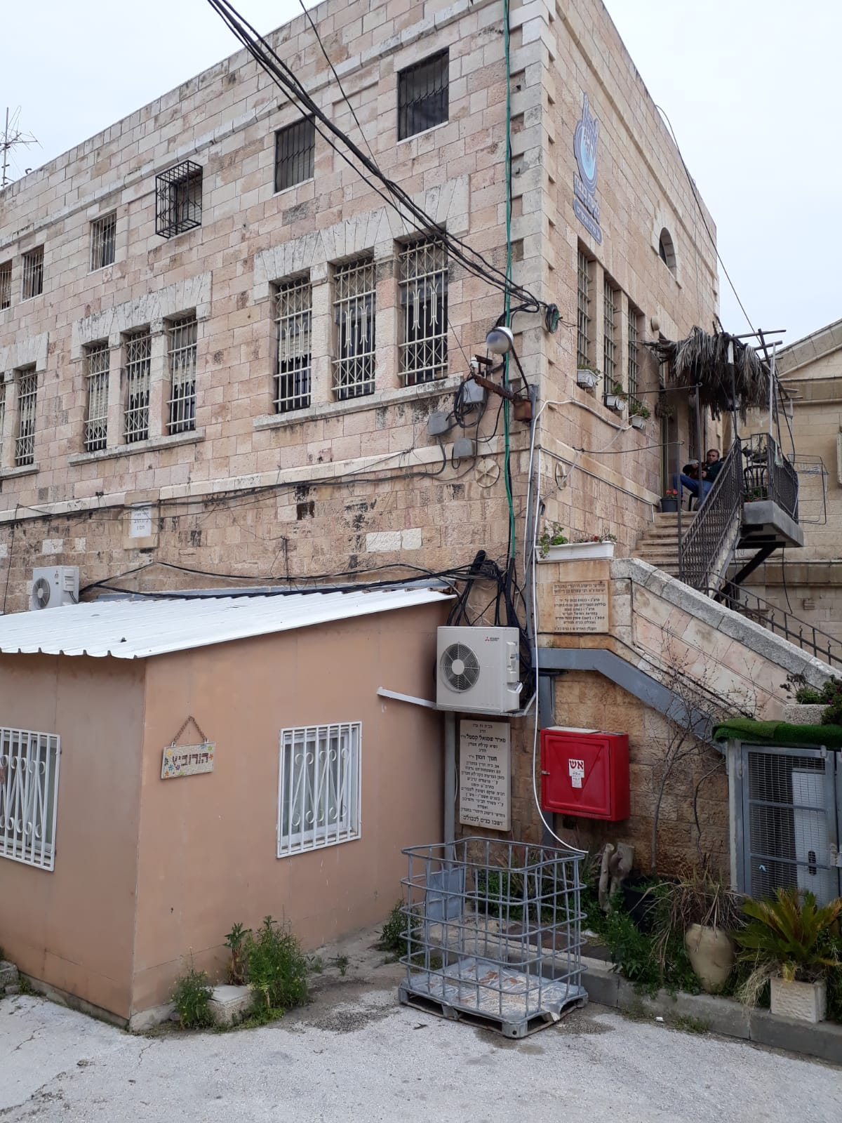 הישיבה על שם עמרם בן דיוואן בחברון, צמוד לבית הדסה. הישיבה ננטשה בעקבות פרעות תרפ"ט, הבניין שוקם ומשמש נכון ל-2019 למגורים